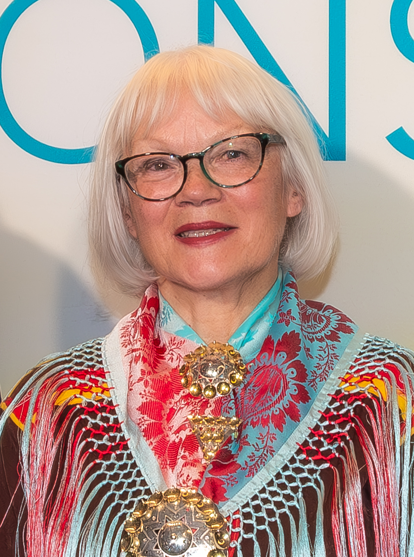 Britta Marakatt-Labba, Sommarvärd i P1, på röda mattan på väg in i Berwaldhallen i Stockholm den 13 juni 2019.